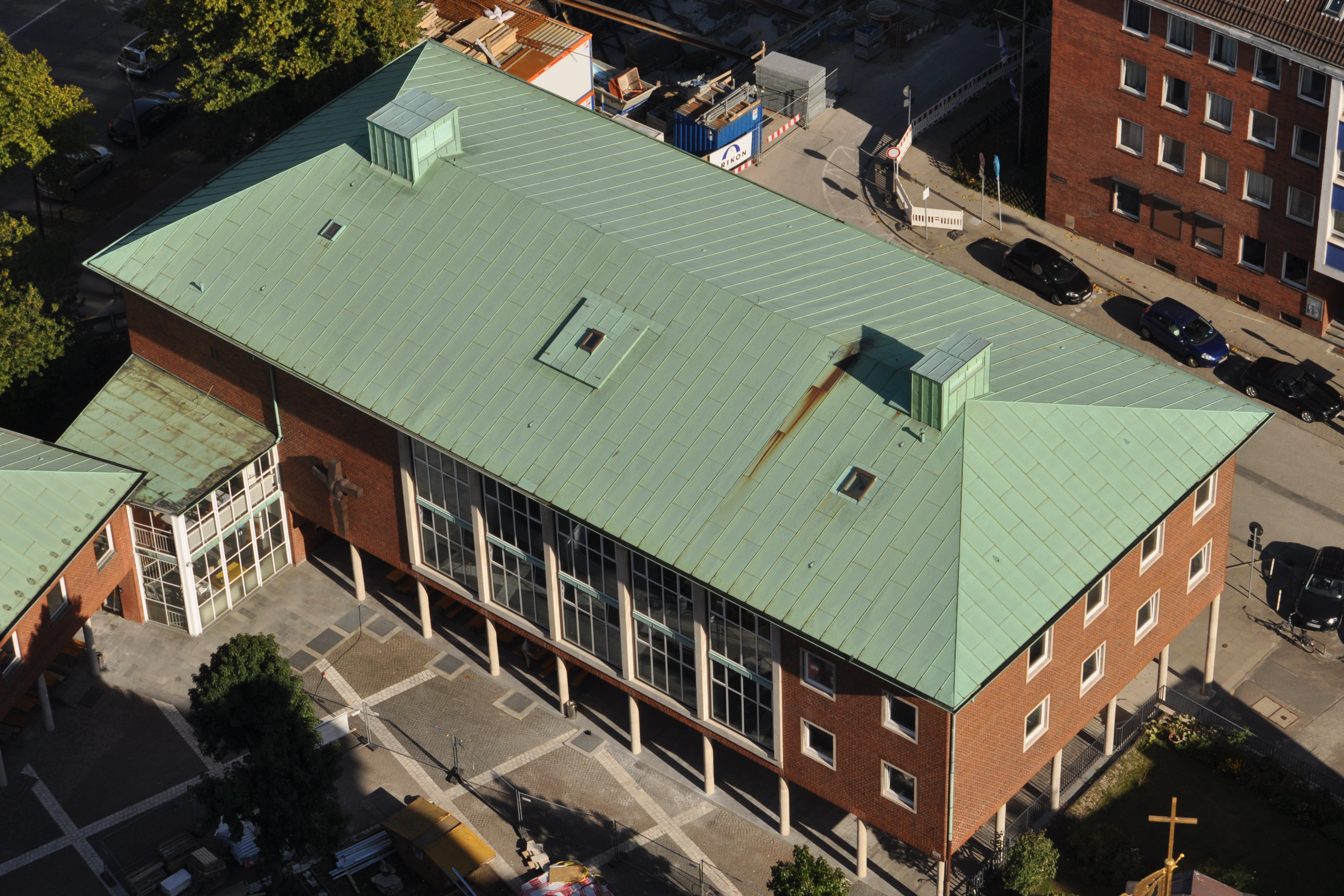 Pastorat/Gemeindehaus Krayenkamp 4 in Hamburg-Neustadt. This is a photograph of an architectural monument.